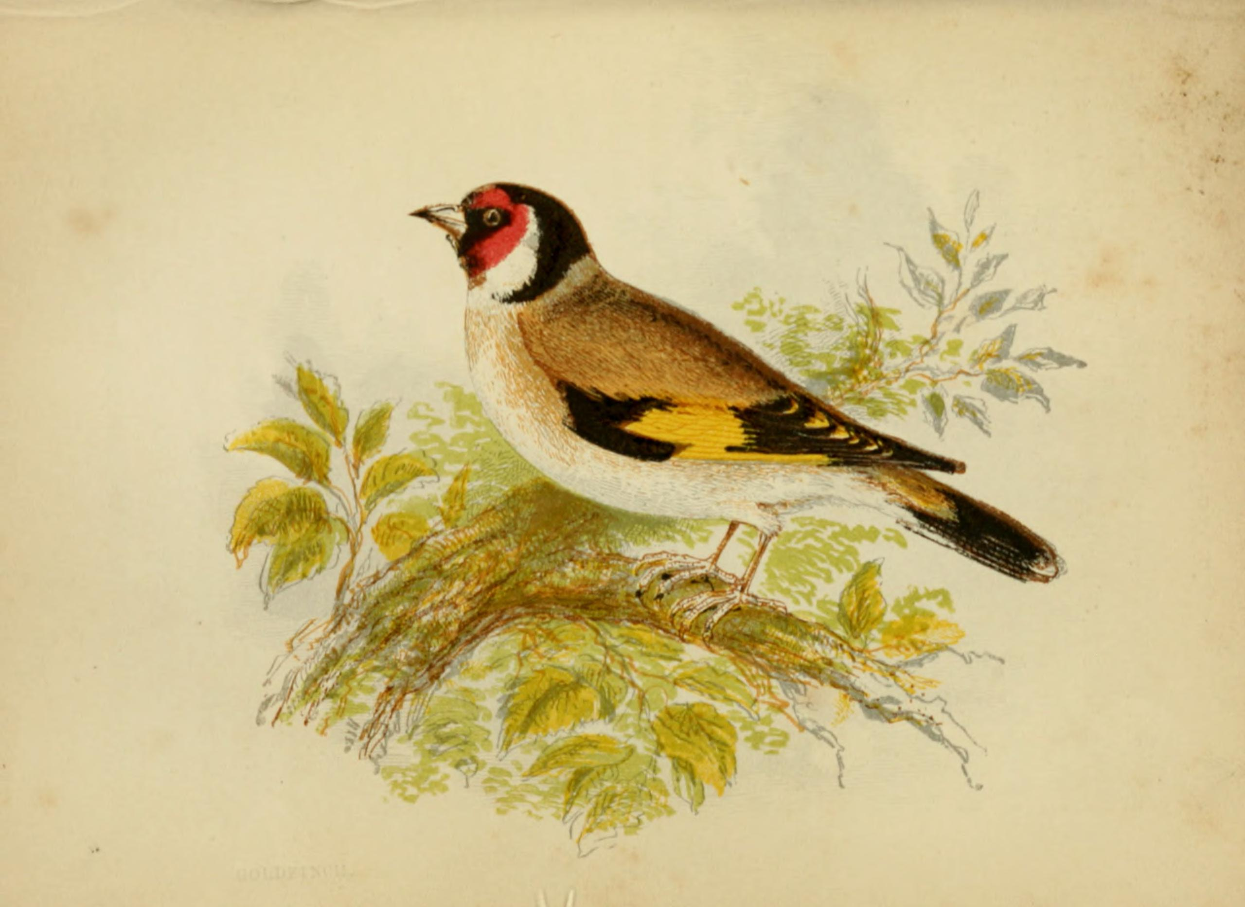 Our native songsters. By Anne Pratt ...